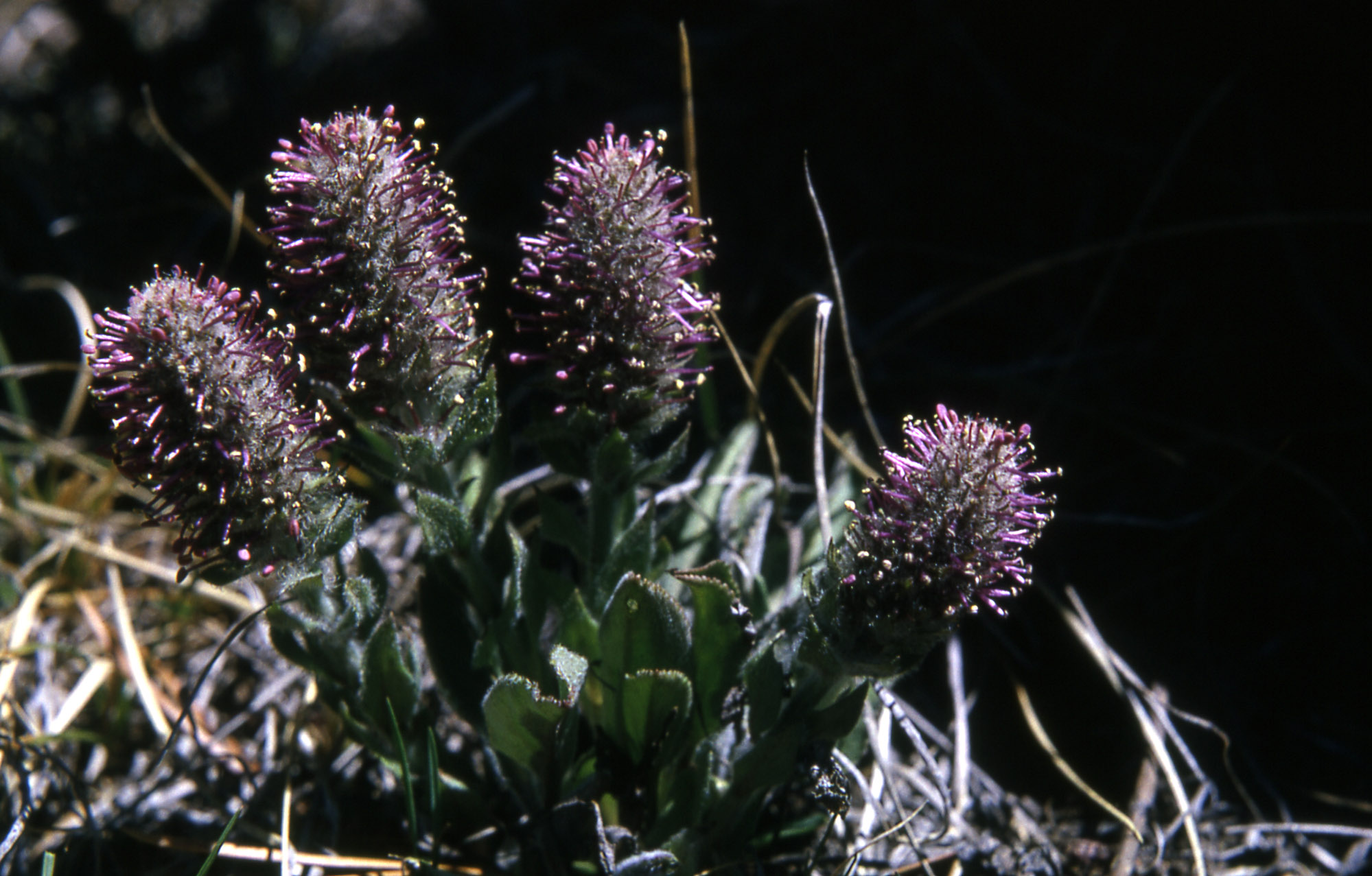 Veronica wyomingensis (Besseya wyomingensis)